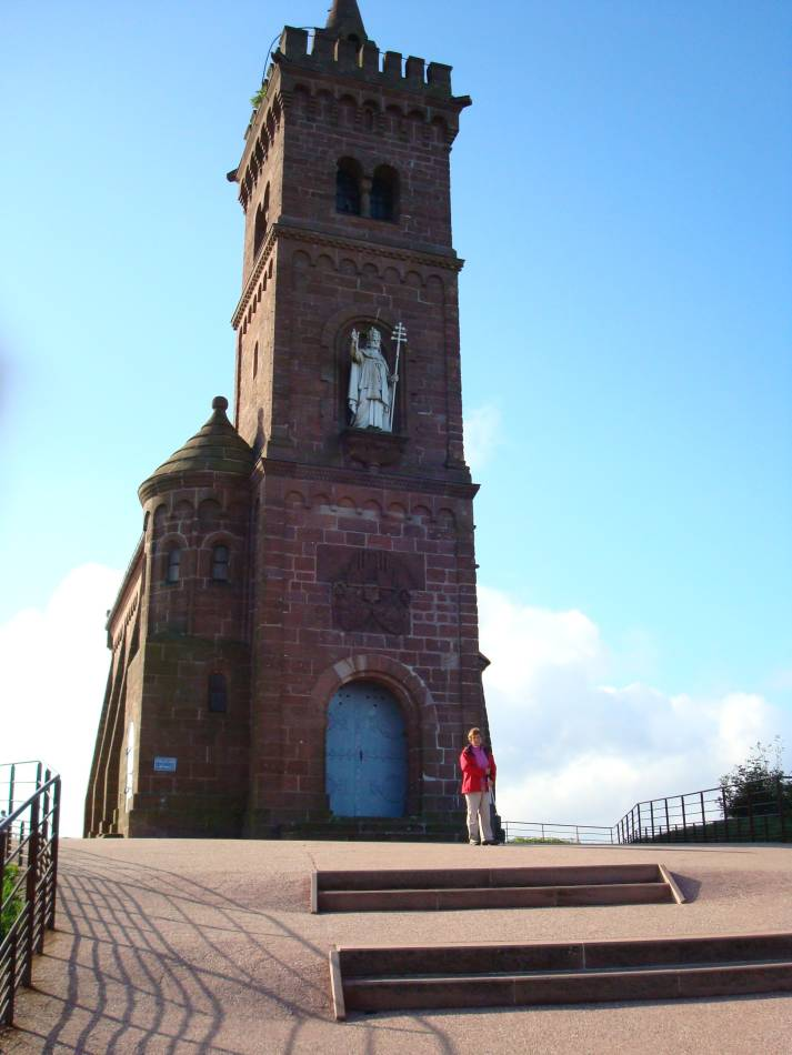 Eglise dédiée à Léon IX sur le rocher de Dabo